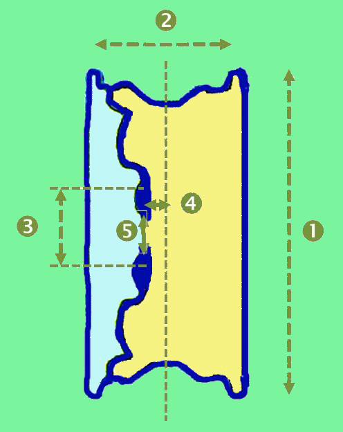 Shéma représentant une jante de voiture avec les principales côtes